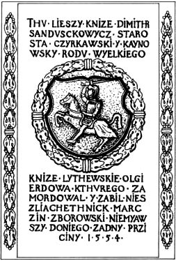 Зарисовка надгробної плити князя Дмитра Санґушка в костелі святого Миколая в м. Яромержі.